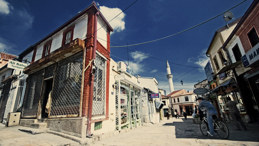 Old Bazaar, Skopje,MK